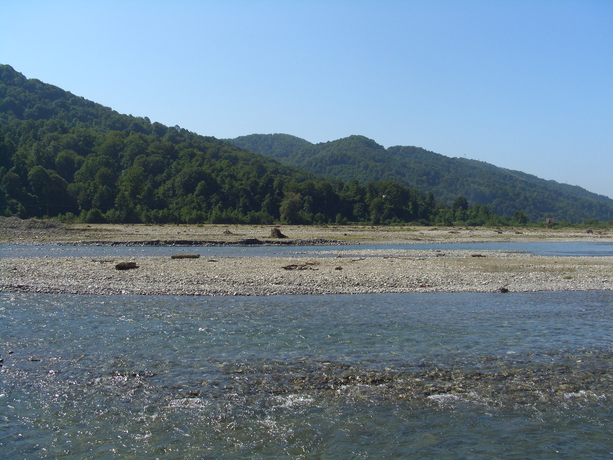 Sochi, Schahe river